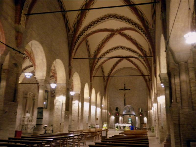 Interno della chiesa di Santa Sofia in Padova.